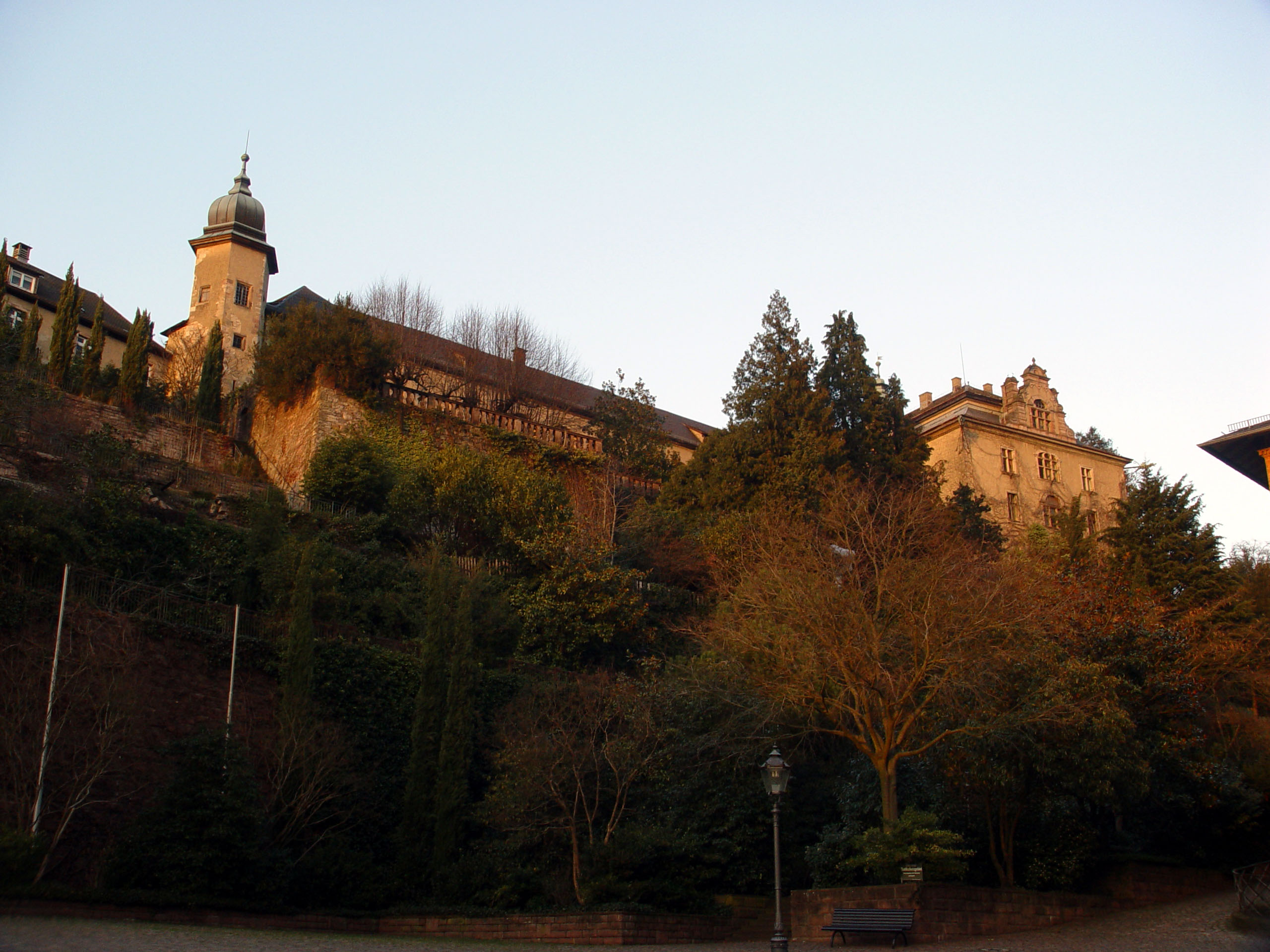 Motiv: Neues Schloss in Baden-Baden. Fotografiert von Martin Dürrschnabel Kamera Sony DSC-F717